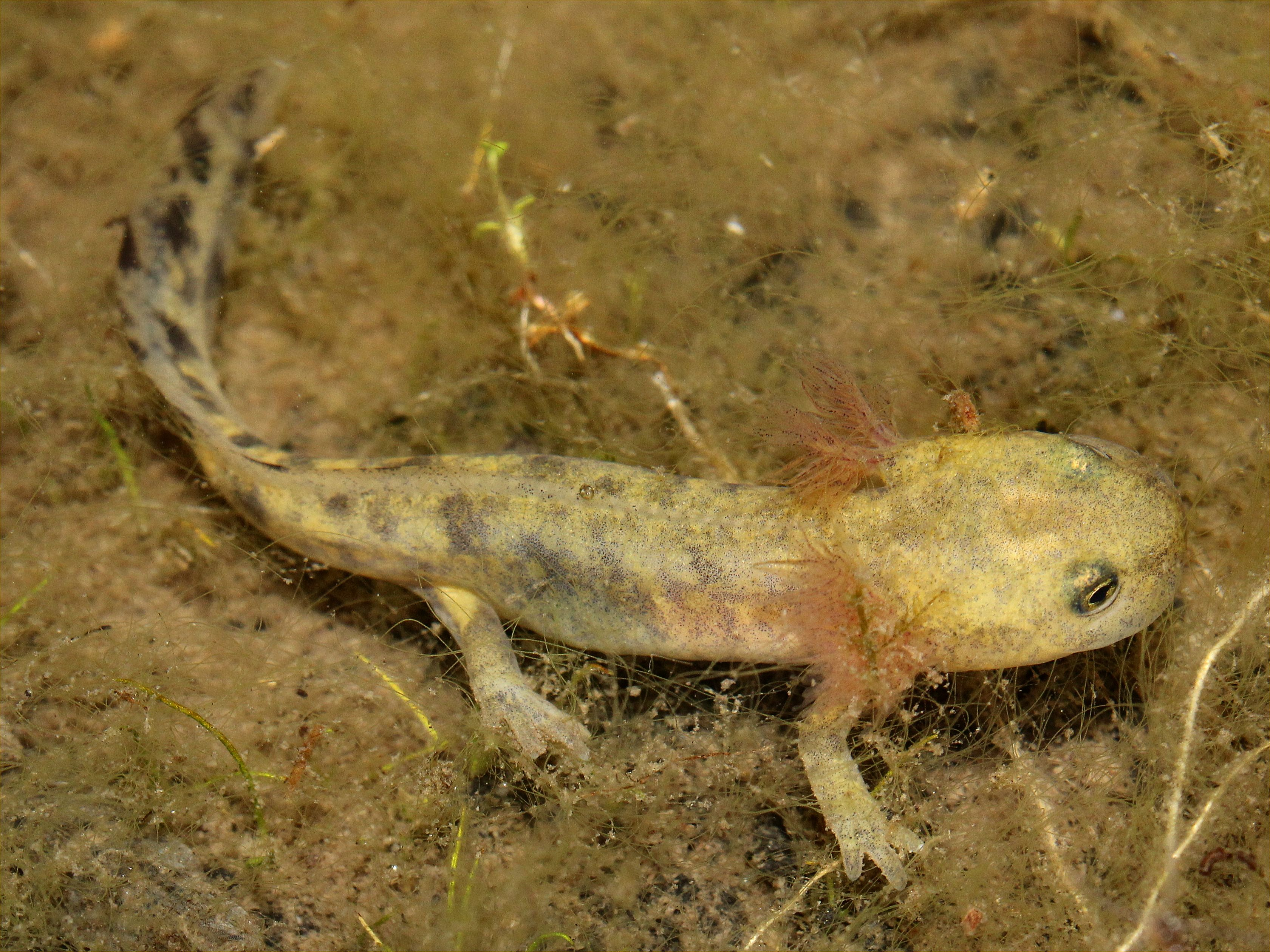 Feuersalamanderlarve